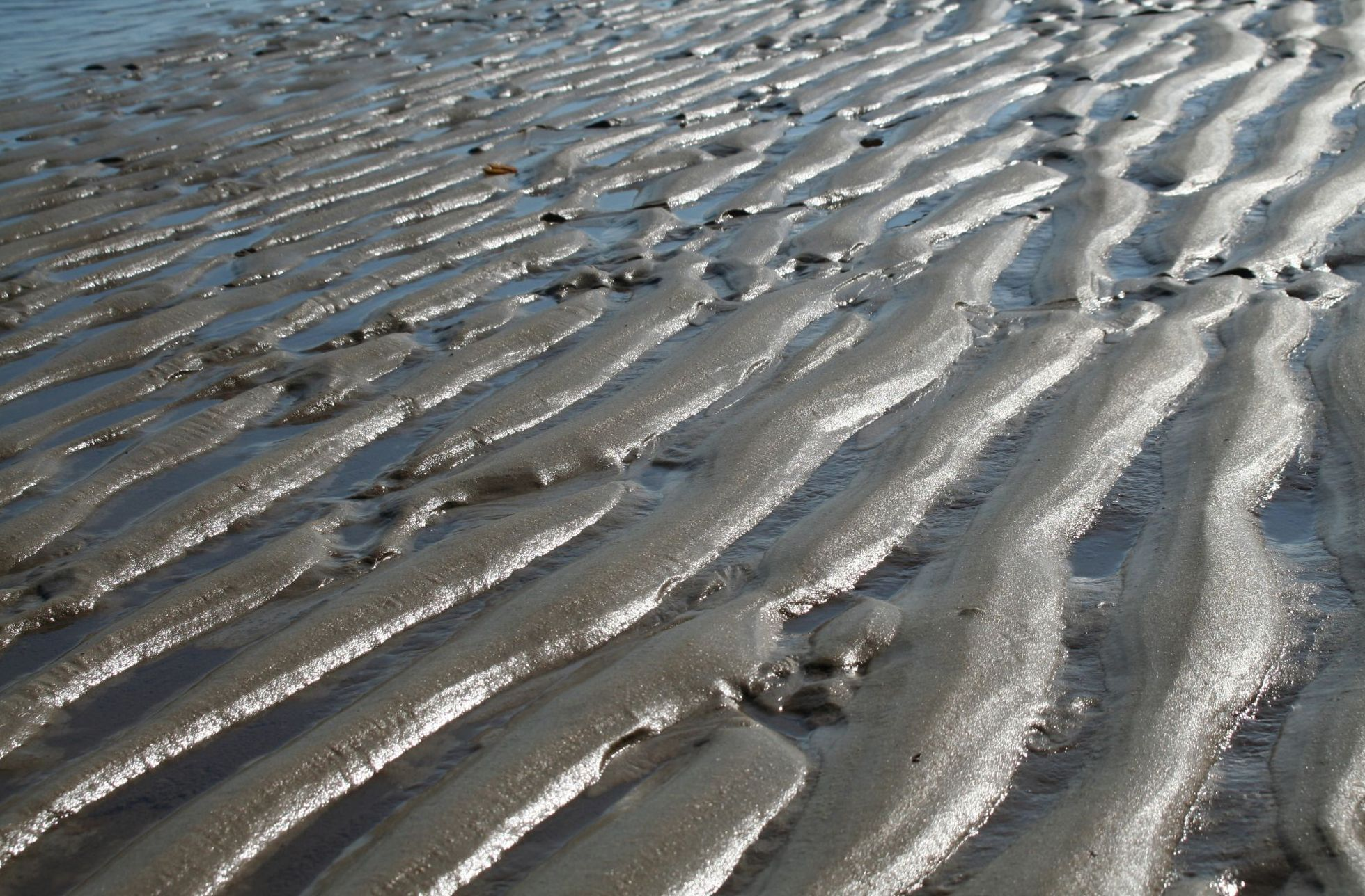 Ebbe am Strand von Borkum